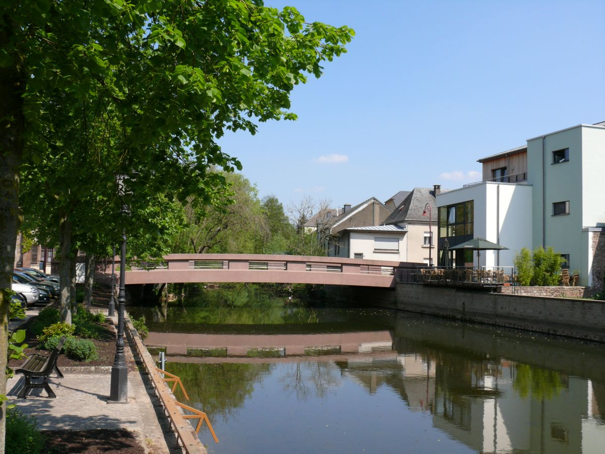 Pont de Bissen sur l'Attert